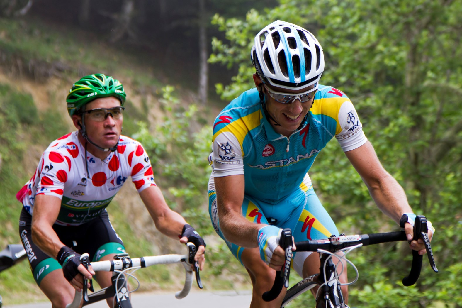 028 voeckler en kessiakof